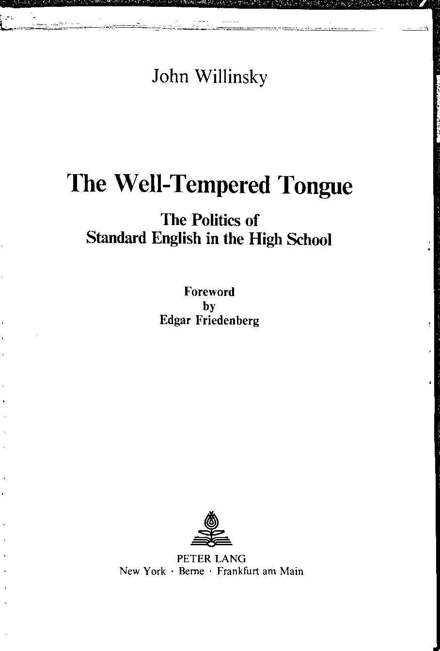 John Willinsky: The well-tempered tongue : the politics of Standard English in the High School. American university studies : Ser. 14 ; 4. New York : Lang, 1984 ISBN 0-8204-0108-0 John Willinsky The well-tempered tongue 1984 Title